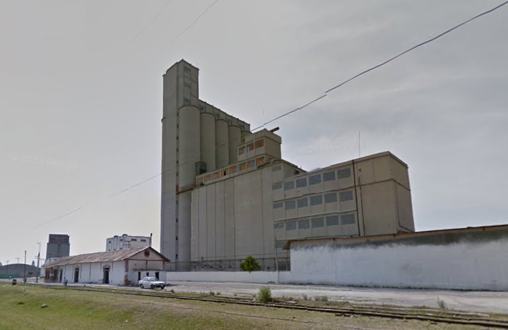 Ubicado en Tlaxcoapan, Hgo.